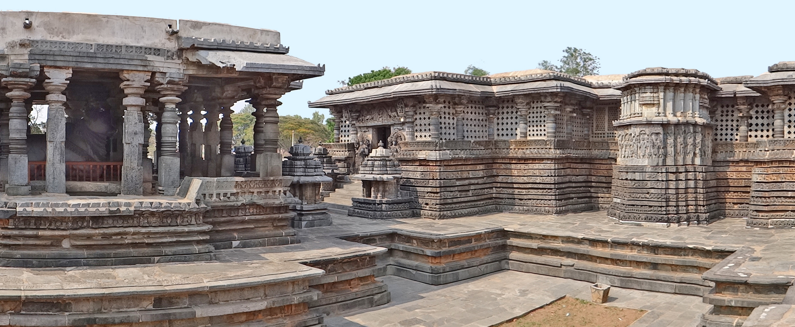 Vue d'ensemble (à gauche : le pavillon du teaureau Nandi) La ville d'Halebid a été la capitale du royaume des Hoysalas. Le temple de Hoysaleshwara a commencé à être construit en 1121 et les travaux se sont poursuivis durant des dizaines d'années. Ce temple dédié à Shiva est célèbre pour la qualité de ses reliefs et de ses sculptures. Le temple est composé de deux sanctuaires reliés entre eux par un couloir avec des fenêtres ouvragées, chacun comprenant un lingam, un mandapa et un taureau Nandi. L'édifice est construit sur une plateforme dont le plan est en étoile comme pour les autres temples hoysalas Les frises sculptées sur les murs extérieurs se développent en registres superposés. Les décors comprennent des dieux, des personnages mythologiques, des musiciens et danseuses, des animaux mythiques et réels et des motifs végétaux raffinés. Article de Wikipedia sur le temple de Hoysaleśvara